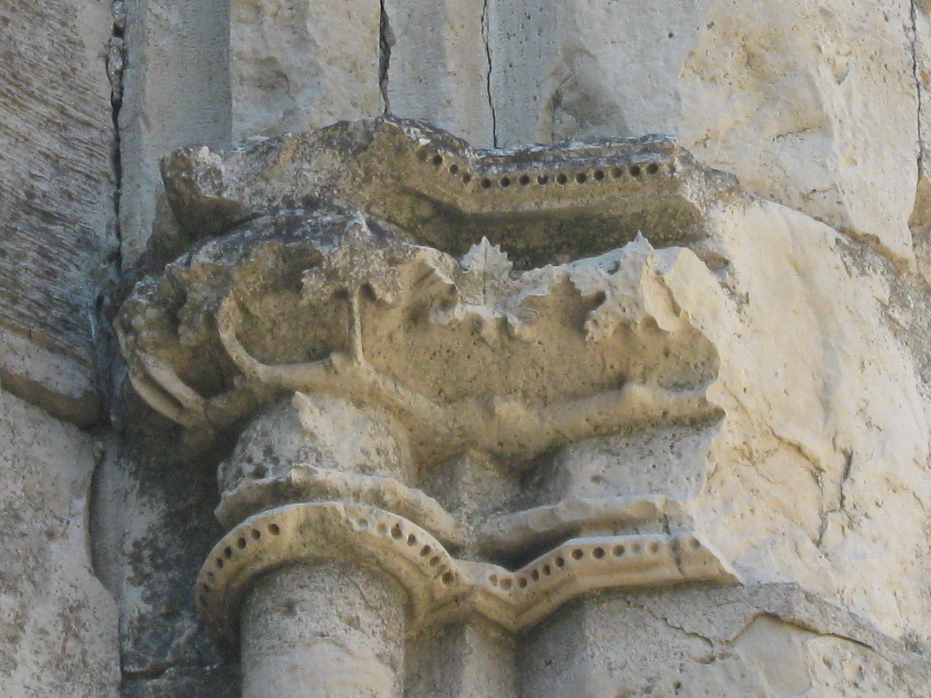 La Tour-sur-Orb (Hérault) - Boussagues - chapiteau gothique de la nef, à l'église de la Trinité (abandonné à l'état de ruine, 13° siècle, gothique méridional)